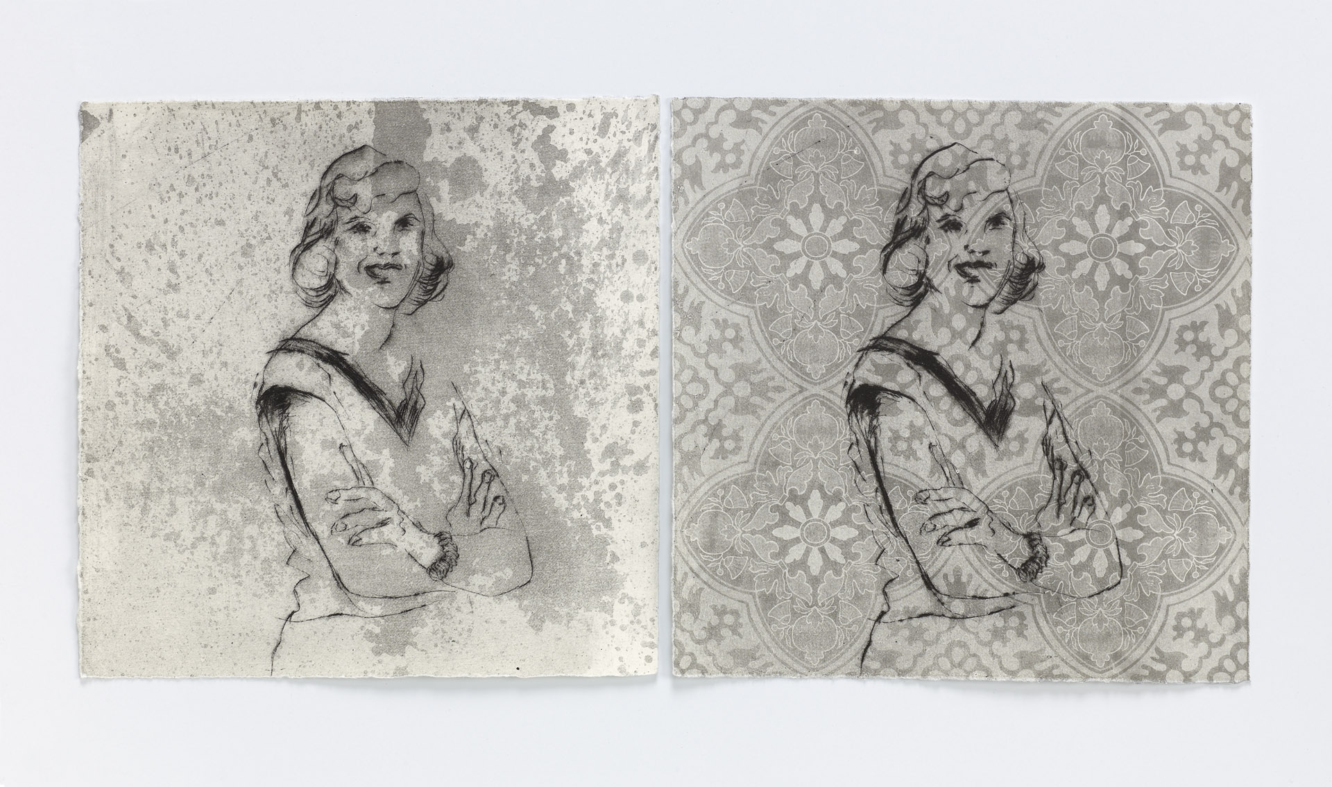 להיות הבת של סילביה, 2014, תחריט יבש, גודל מלא: 40/60 ס"מ, מתוך התערוכה "גרייס קלי מרחוב אוליפנט", גלריה משרד בתל אביב.